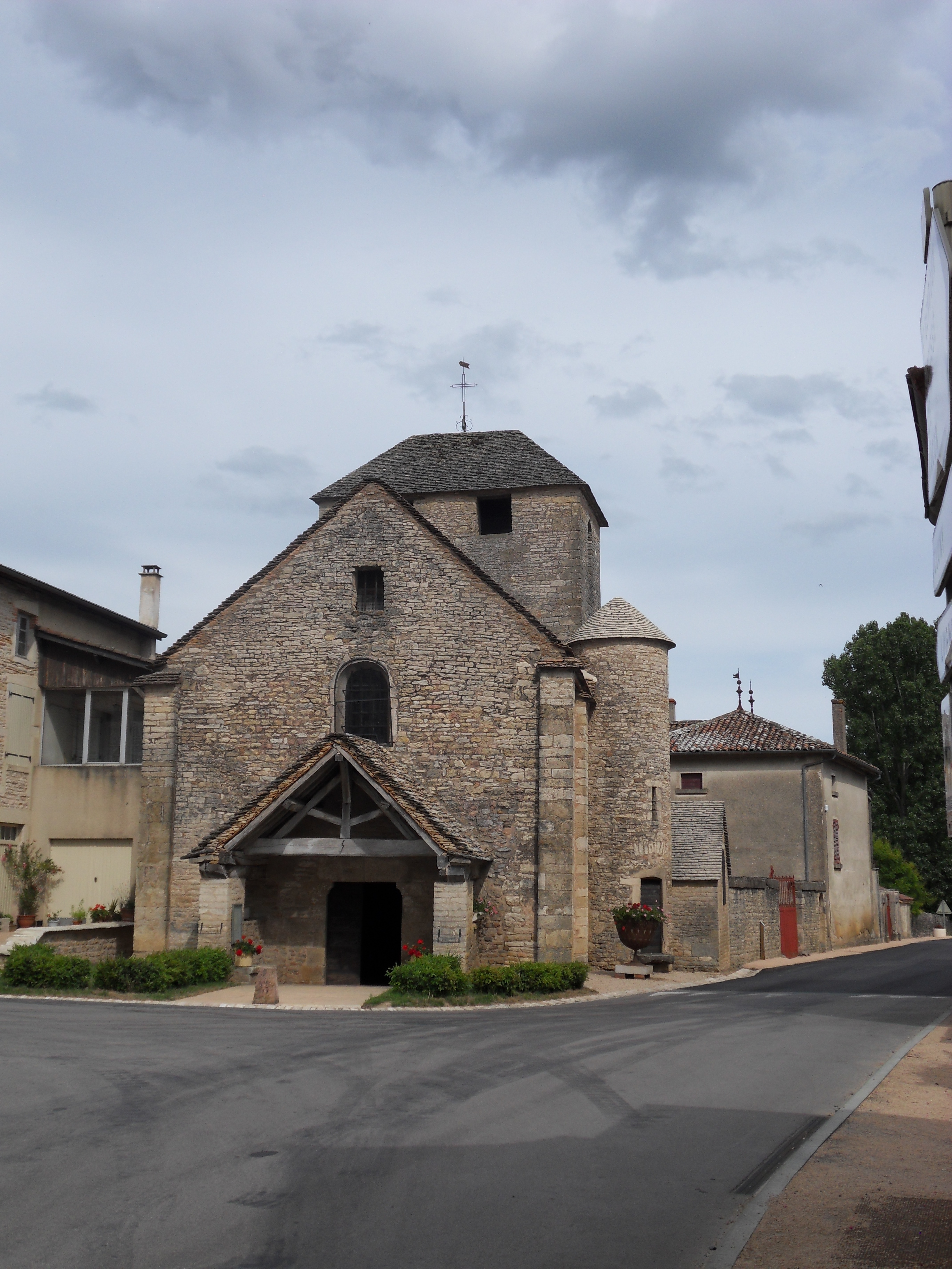 Eglise de Bissy-la-Maconnaise